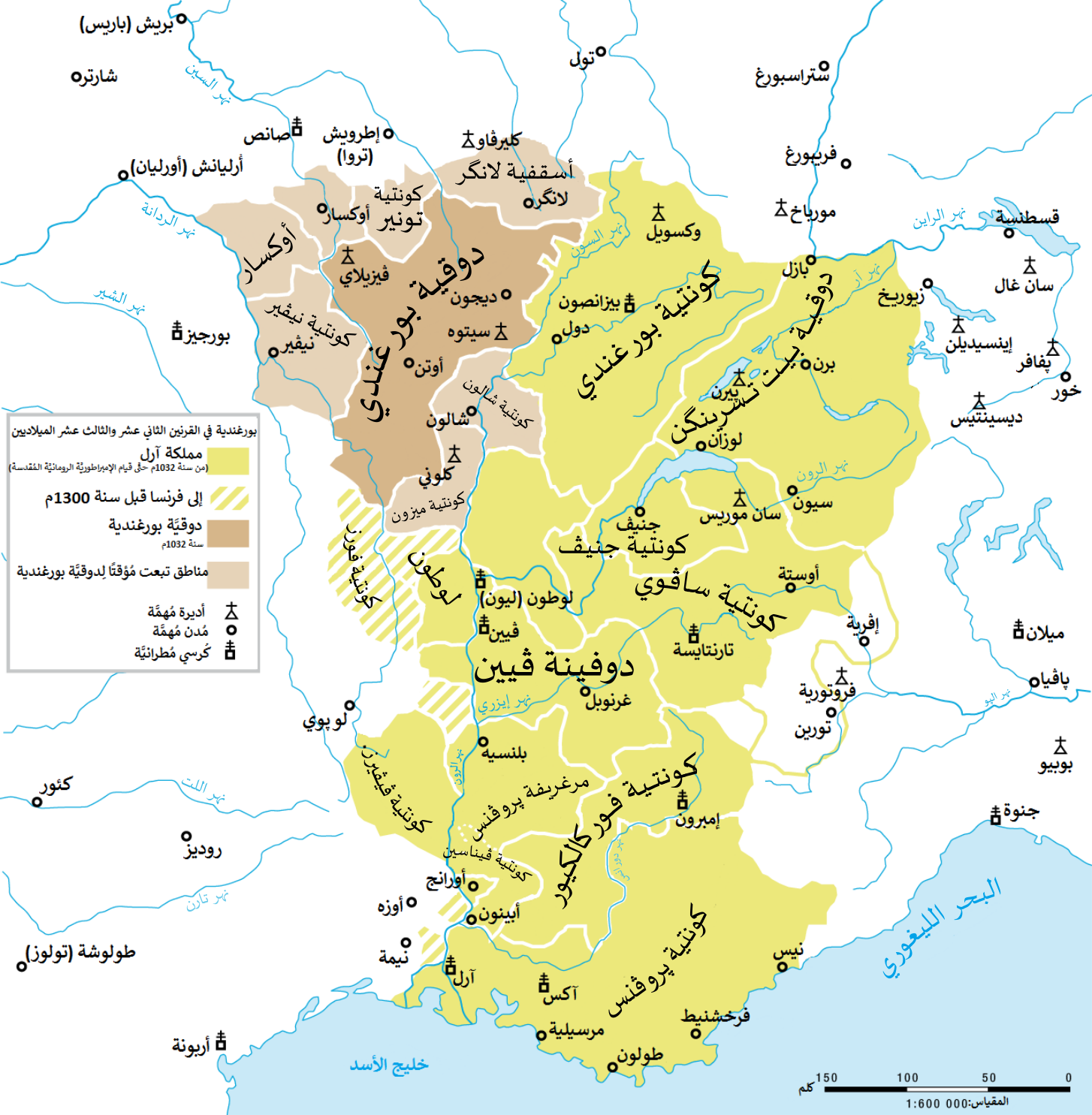 مملكة آرل ودوقيَّة بورغندية القبطانيَّة في القرنين الثاني عشر والثالث عشر الميلاديين.